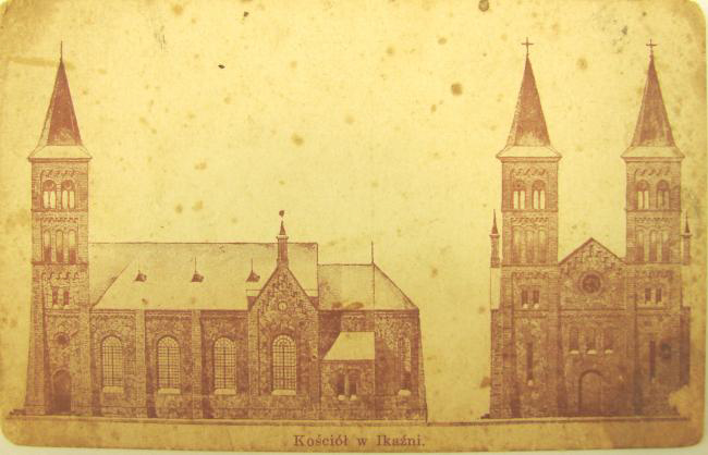 Беларуская (тарашкевіца): Іказьнь (Ikaźń). Касьцёл Божага Цела, праект